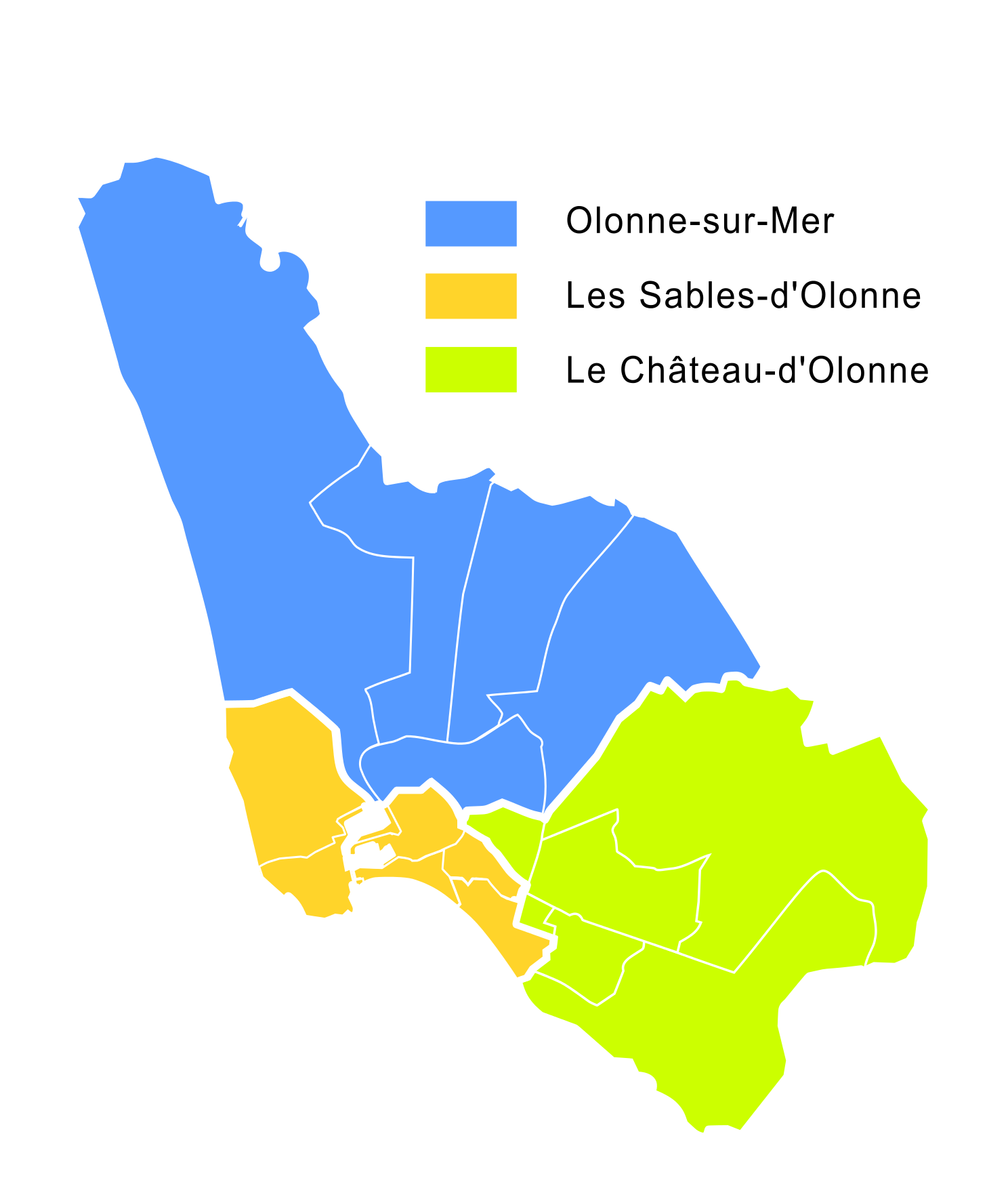 Carte des anciennes communes de la communauté de communes des Olonnes: Olonne-sur-Mer (en bleu), le Château-d'Olonne (en vert), Les Sables-d'Olonne (en orange).